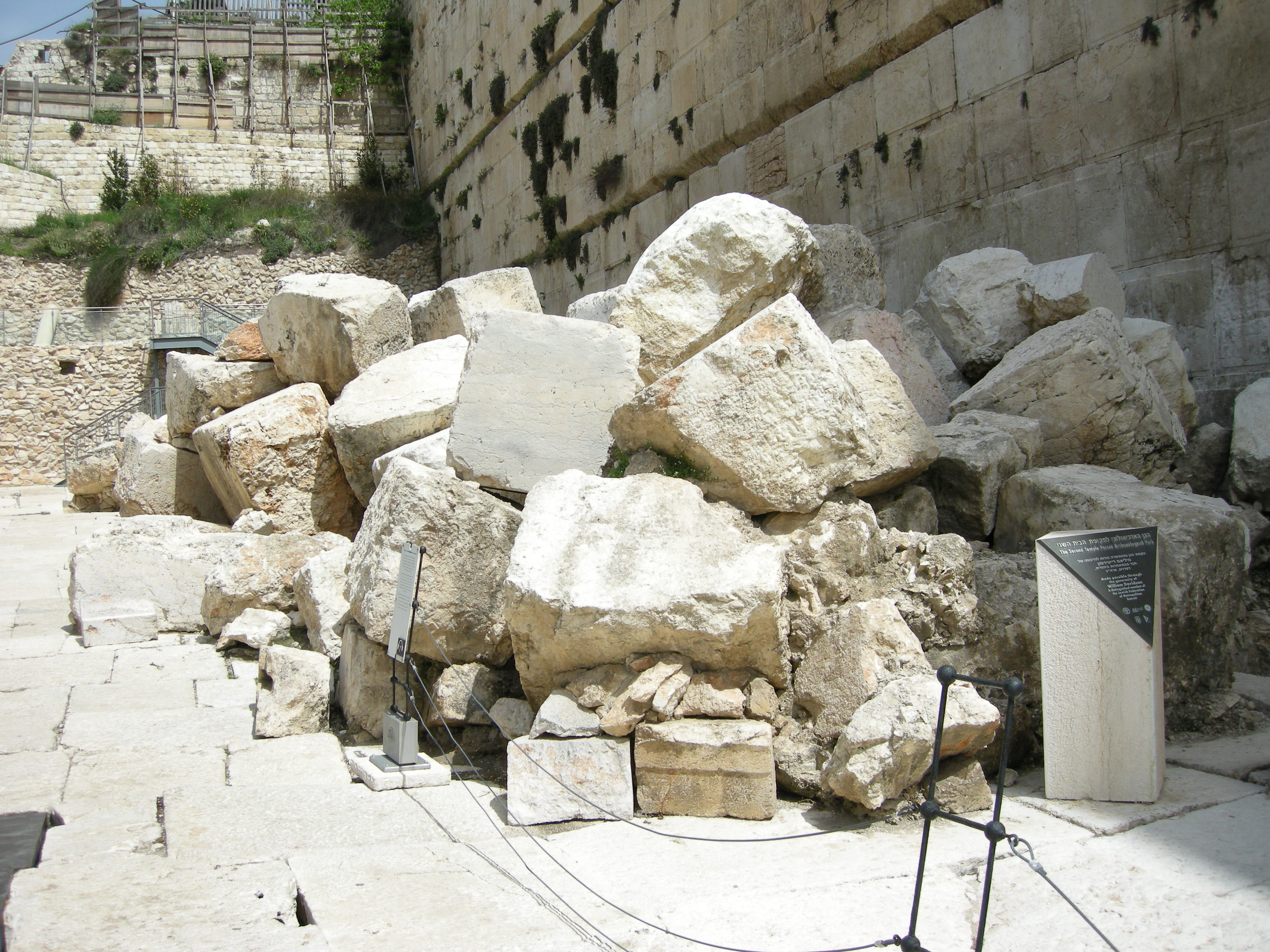 Western Wall